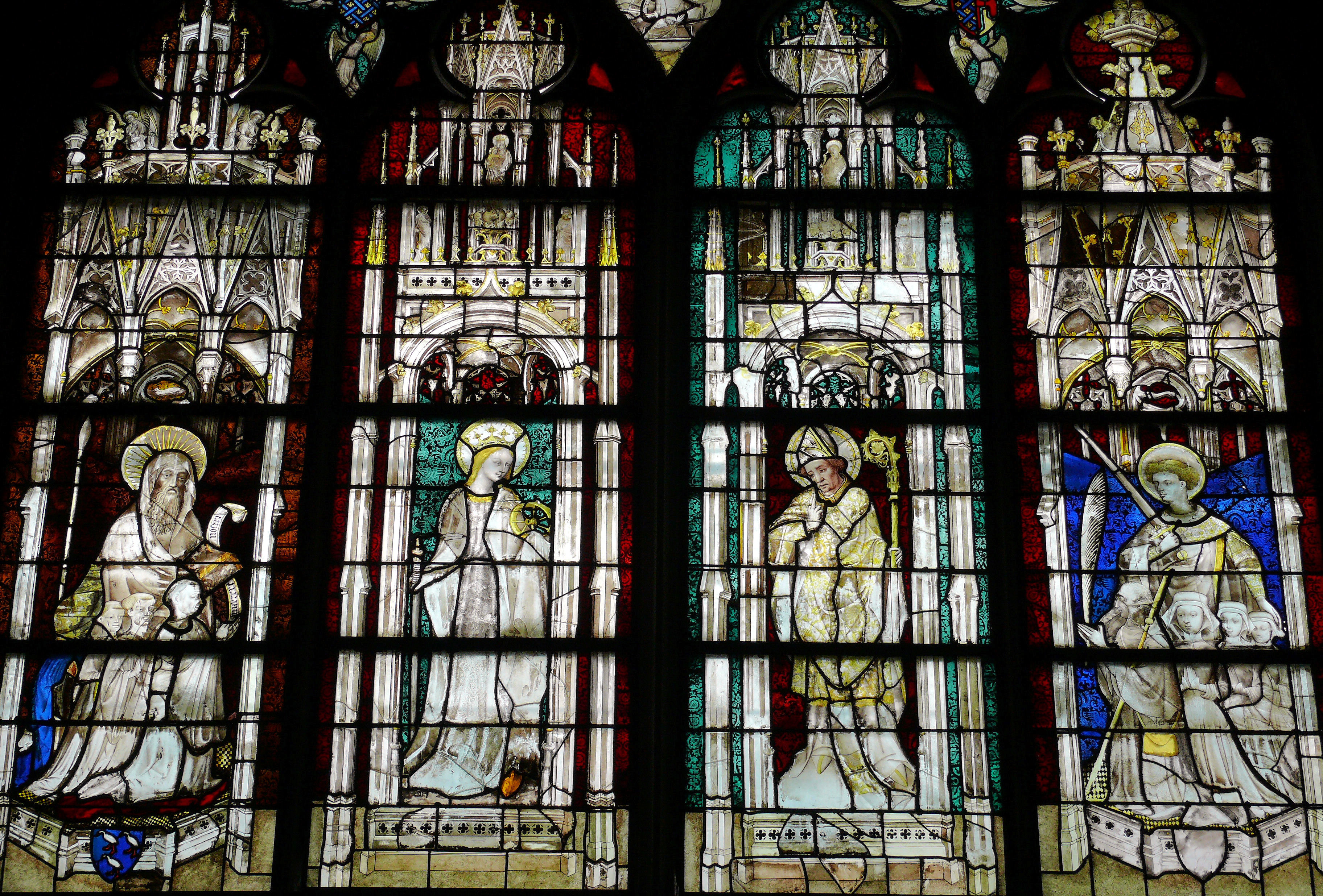 Bourges - Cathédrale - Chapelle Aligret